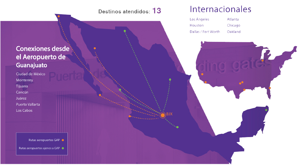 Destinos de León